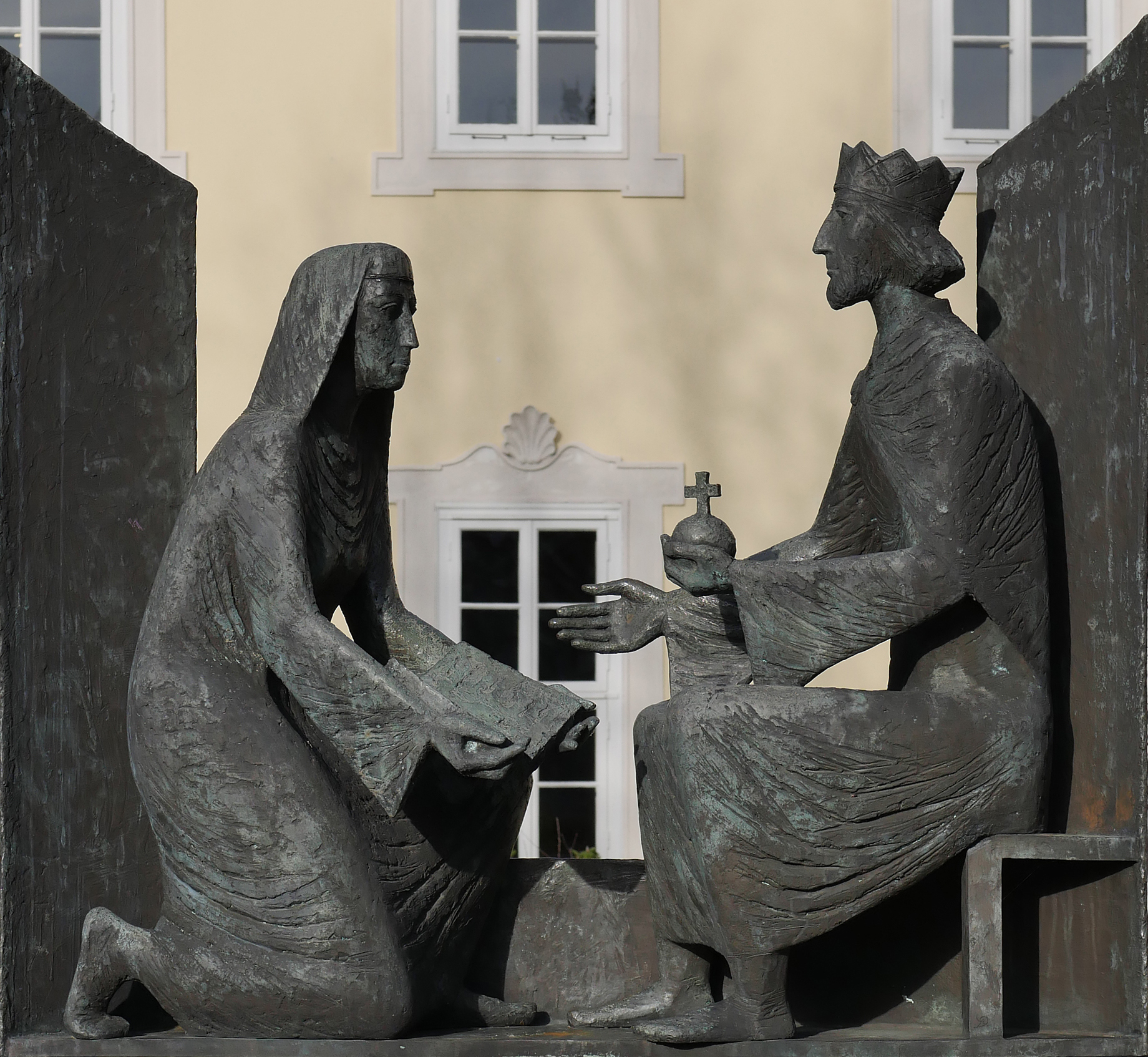 Dieses 1978 errichtete Denkmal zeigt links die erste deutsche Dichterin, Roswitha von Gandersheim.